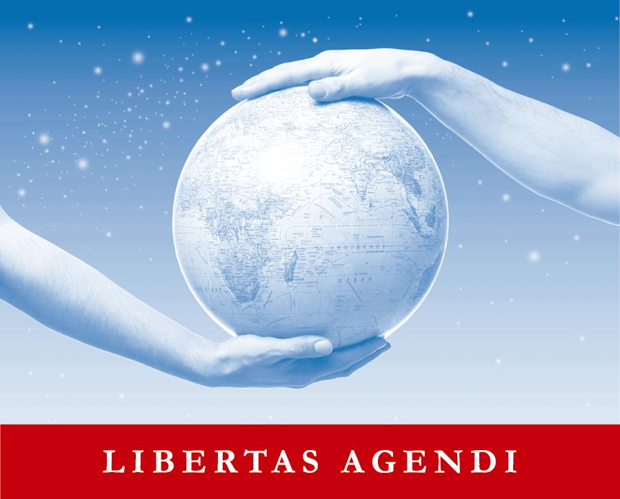 Logo der Stiftung für die Rechte zukünftiger Generationen